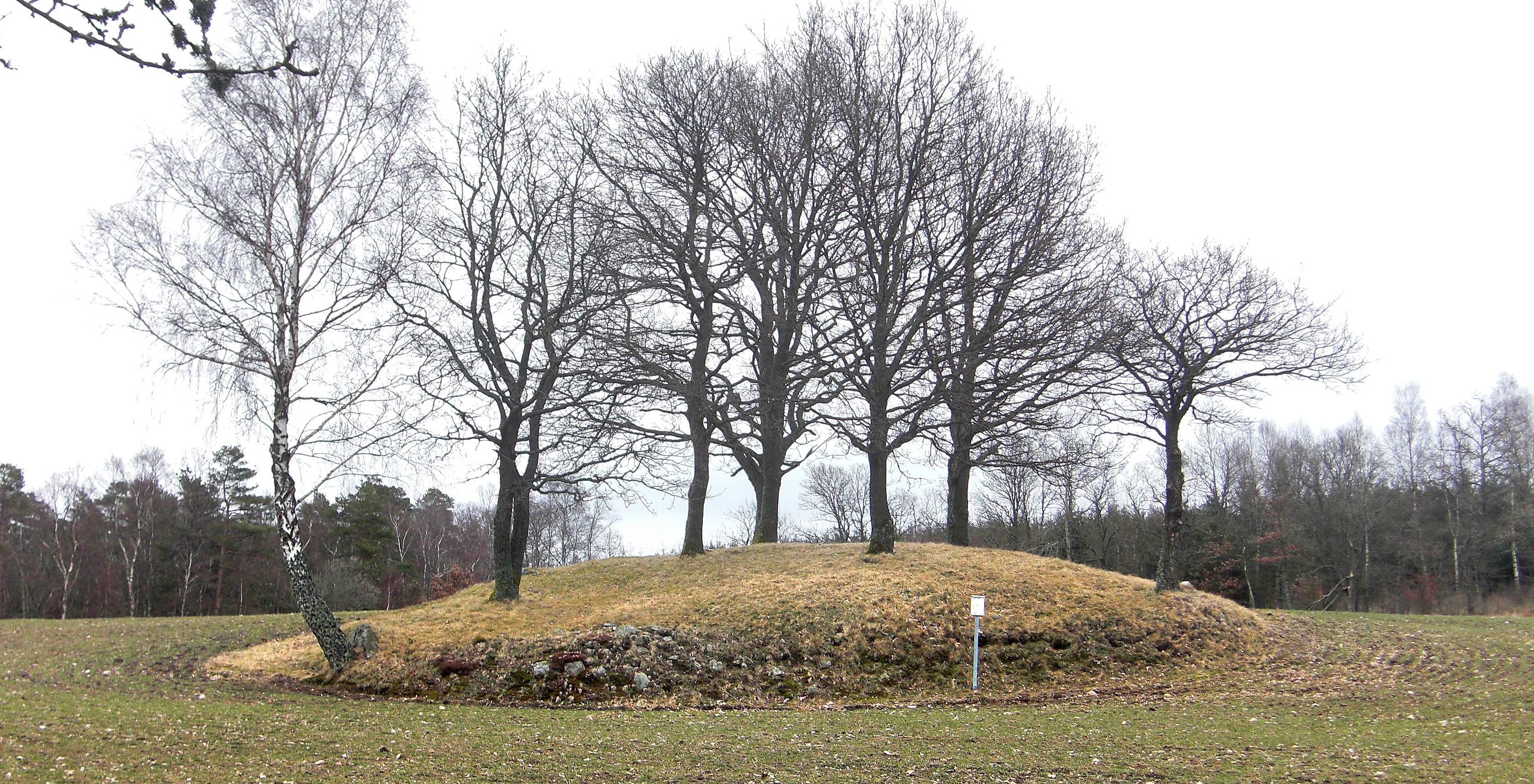 Den senneolitiska hällkistan i Bostället (RAÄ-nr Asige 19:1) i Asige socken, Årstads härad, Falkenbergs kommun, Halland, Hallands län, Sverige.